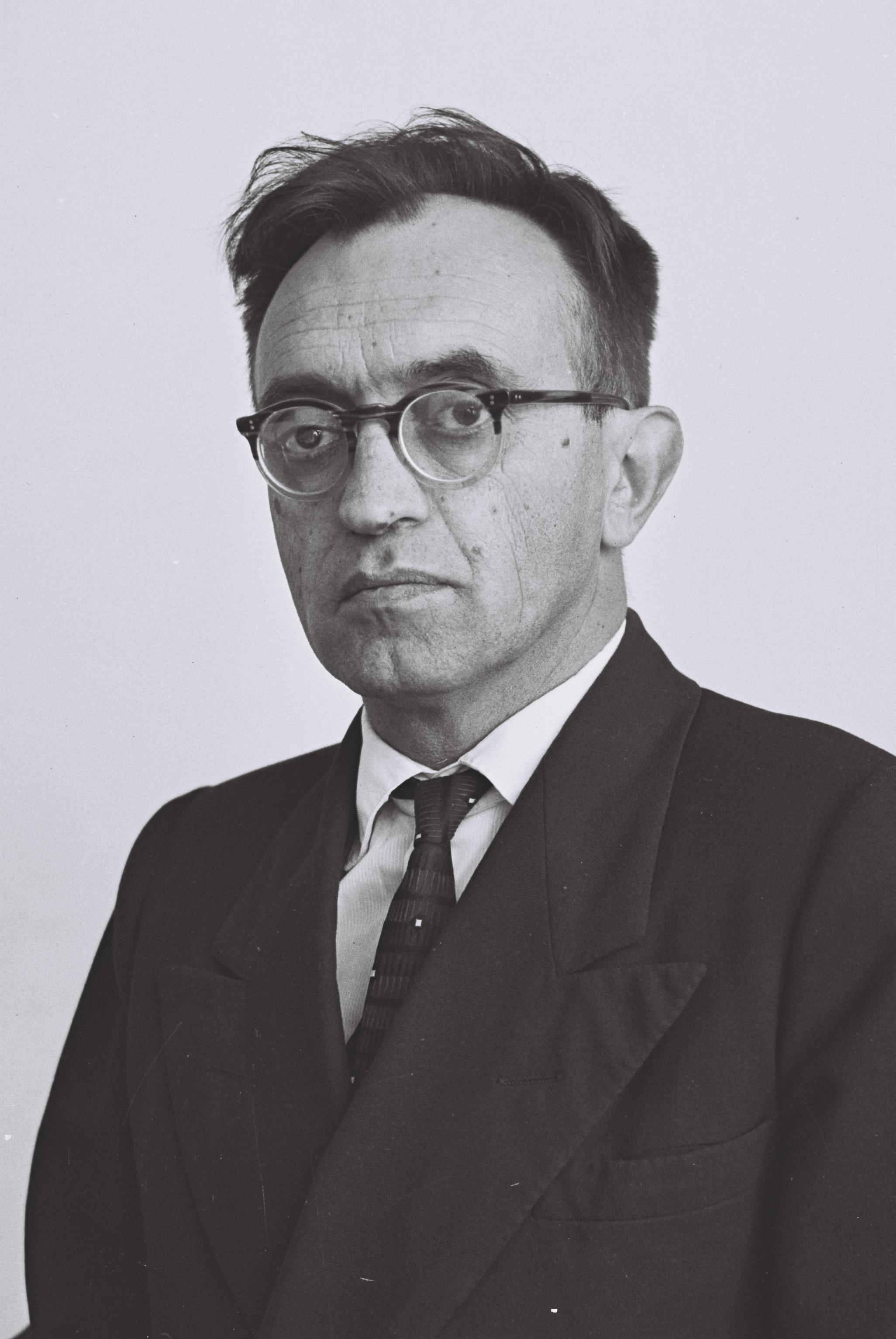 Eliyahu Meridor